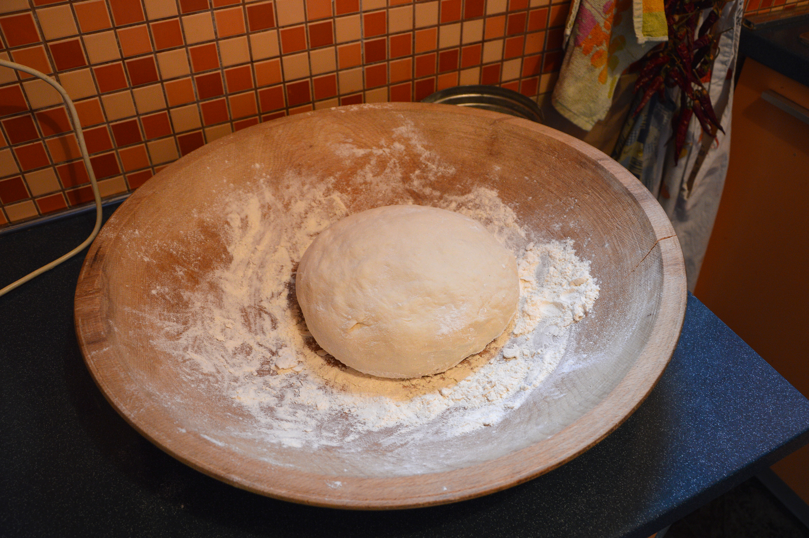 Нощви със замесено тесто.